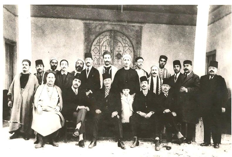 صورة يظهر فيها نفر من قادة الحزب الحرّ الدستوري التونسي صحبة عدد من حملة القلم وصنّاع الرأي العام في لقاء في قصر الأديب والشاعر مصطفى آغا بالكرم سنة 1923 ، الجالسون من اليمين: أحمد توفيق المدني، الطيب الجميل، الفتى المنجي ابن الشاعر محمد الشاذلي خزندار، أحمد الصافي ، صالح فرحات، علي كاهية. الواقفون من اليمين: محمّد الجعايبي، محمّد الشاذلي خزندار، حمّودة فرحات، حسن آغا، علي بوكرداغة، محمّد بن مصطفى المعتمري، عبد الرحمان اليعلاوي، محمّد محيي الدين القليبي، حسين الجزيري، الشيخ صالح بـن يحيى ، زين العابدين السنوسي، الهادي الزبيدي، الطاهر آغا، قاسم الحامي.